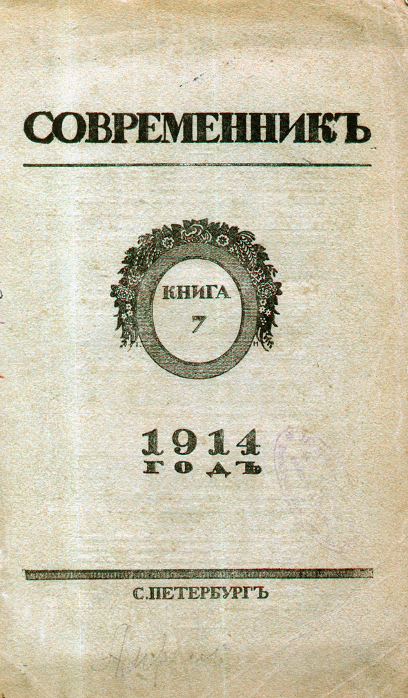 "Современник", 1914 г., обложка